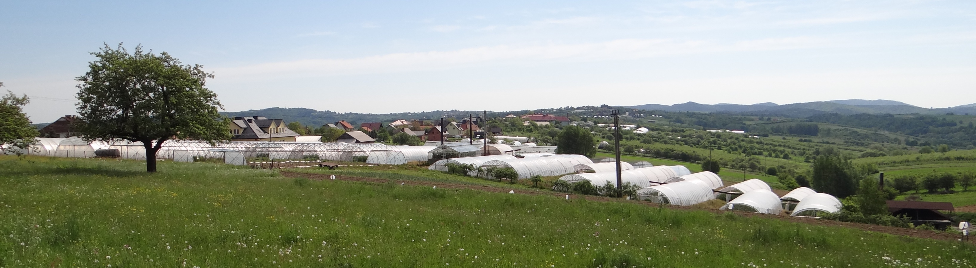 "Leszczyńskie krajobrazy"